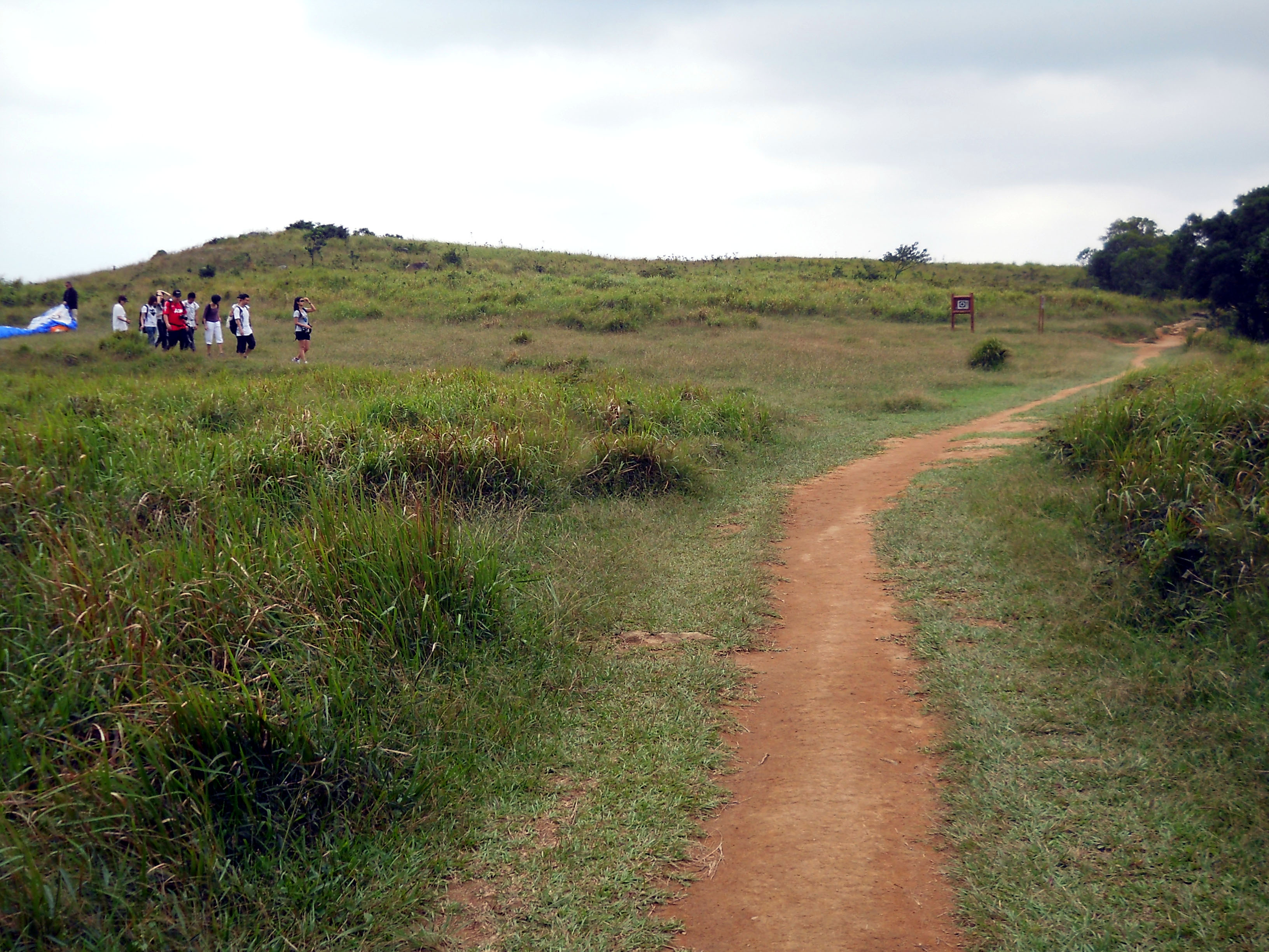 中文（香港）: 昂平